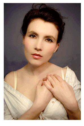 wensdy